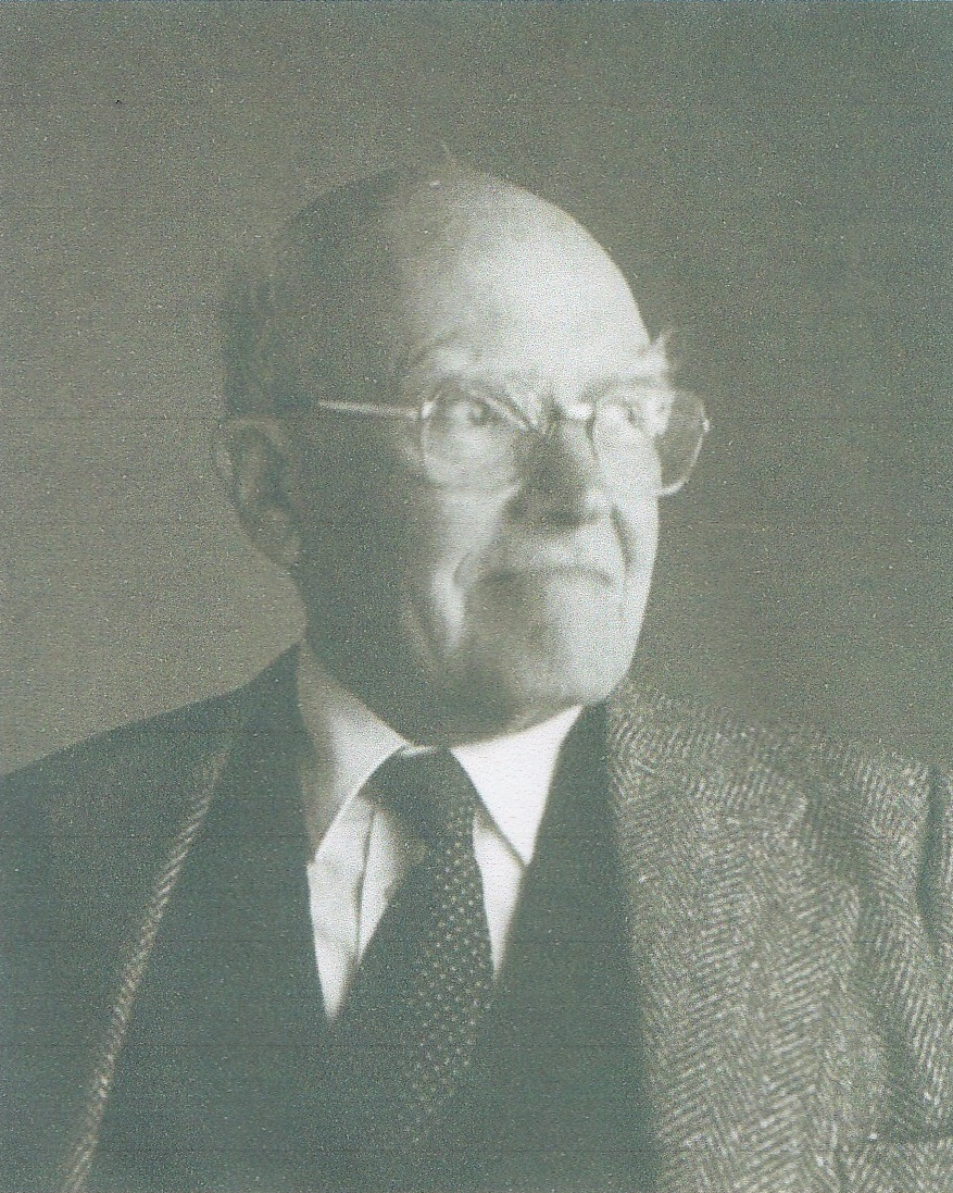 eladio